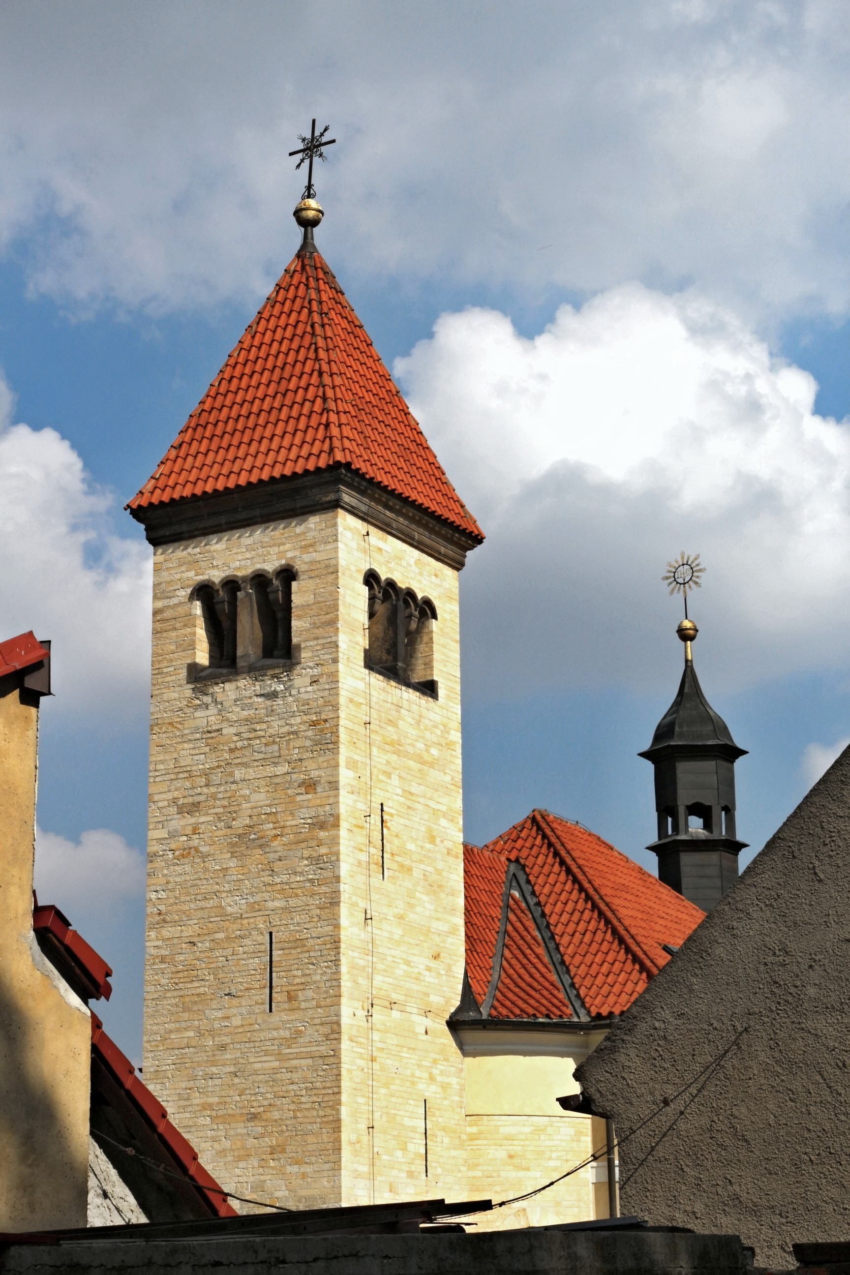 Kostel svatých Petra a Pavla v Řeporyjích